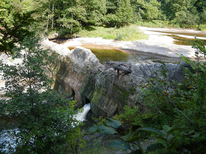 Barrage du moulin Beaudet sur la rivière Bourret à Saint-Antoine-de-Tilly (Chaudière-Appalaches), au Québec. Moulin à eau, moulin à farine.